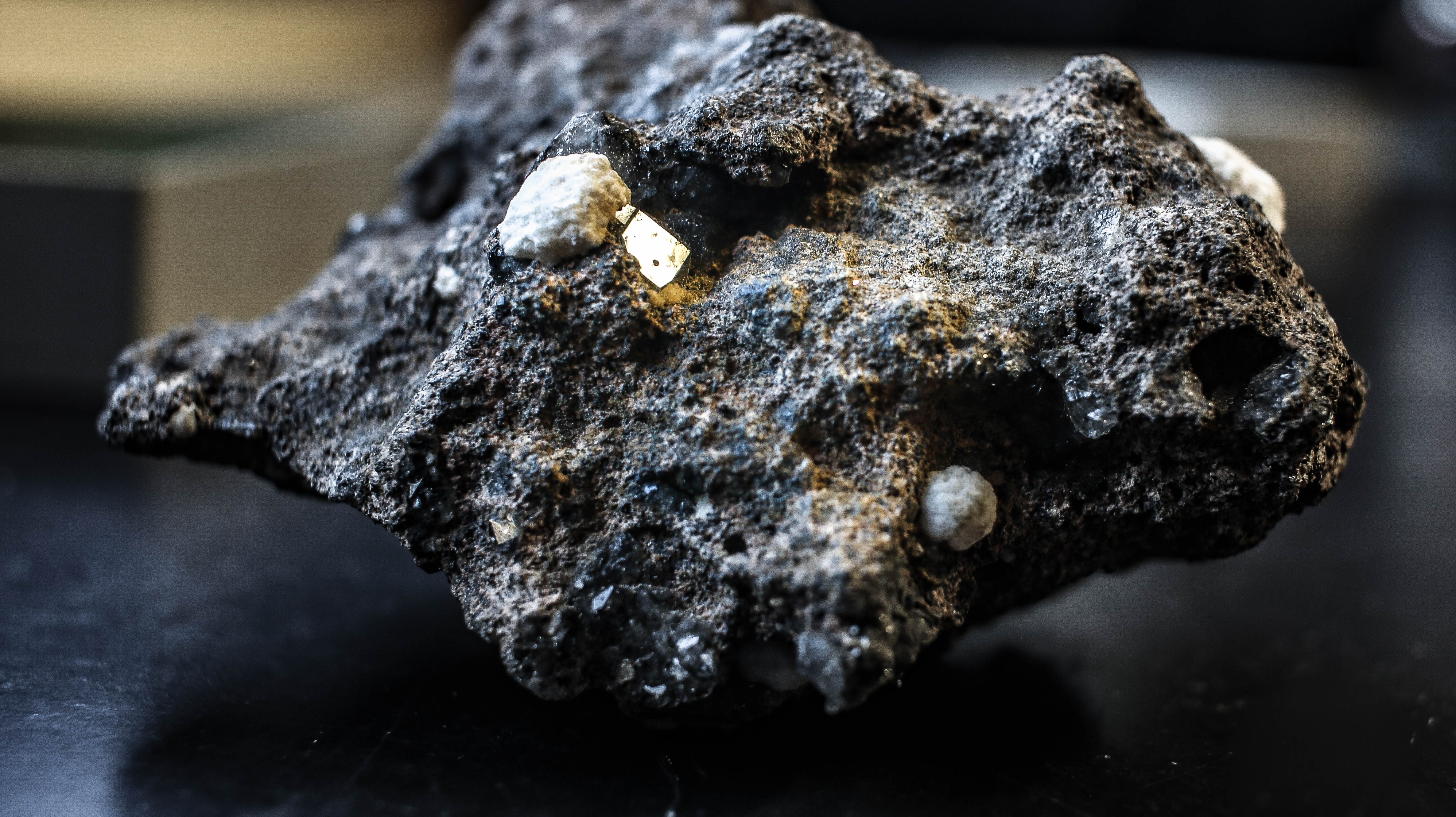 roccia vulcanica con zeoliti visibili (strutture biancastre).